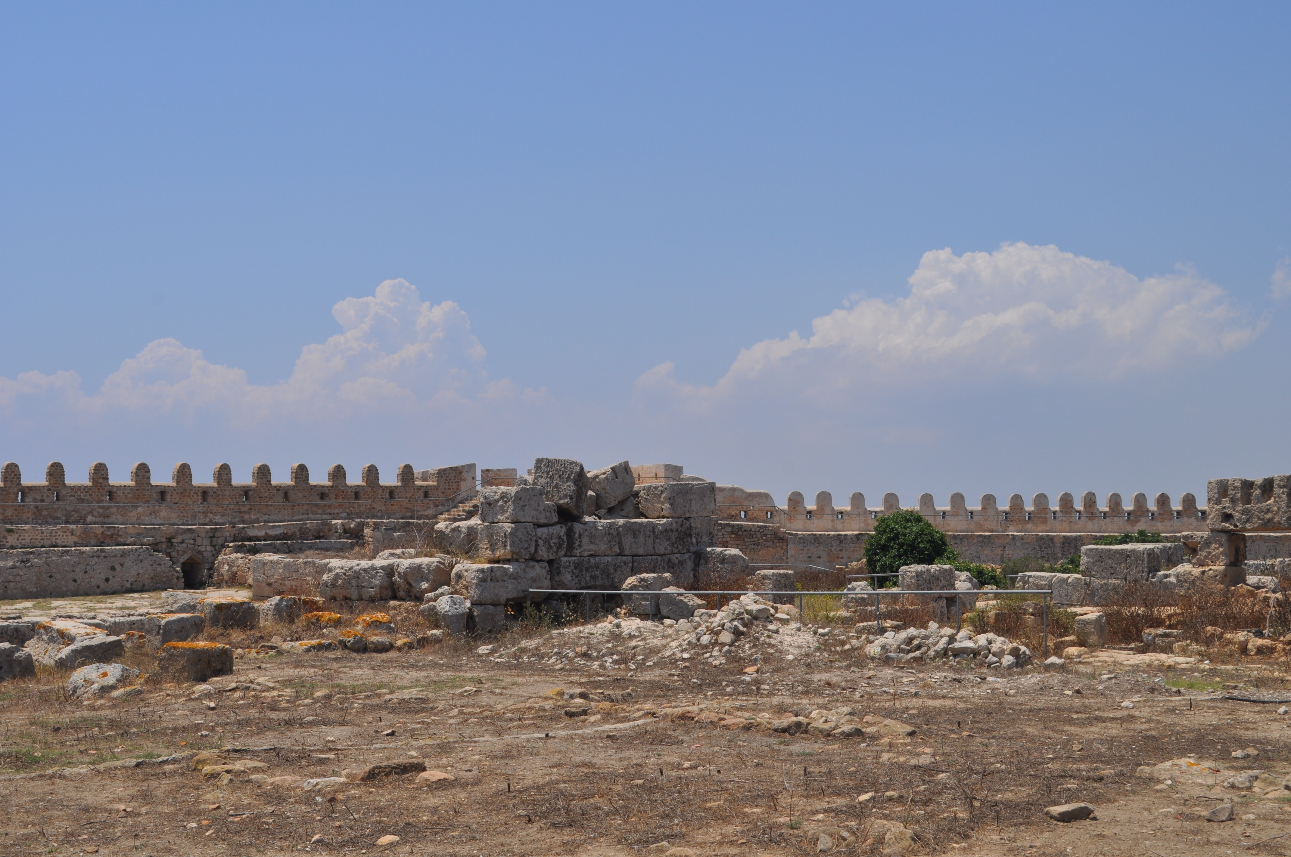 Ancien fort appelé « Kasba »